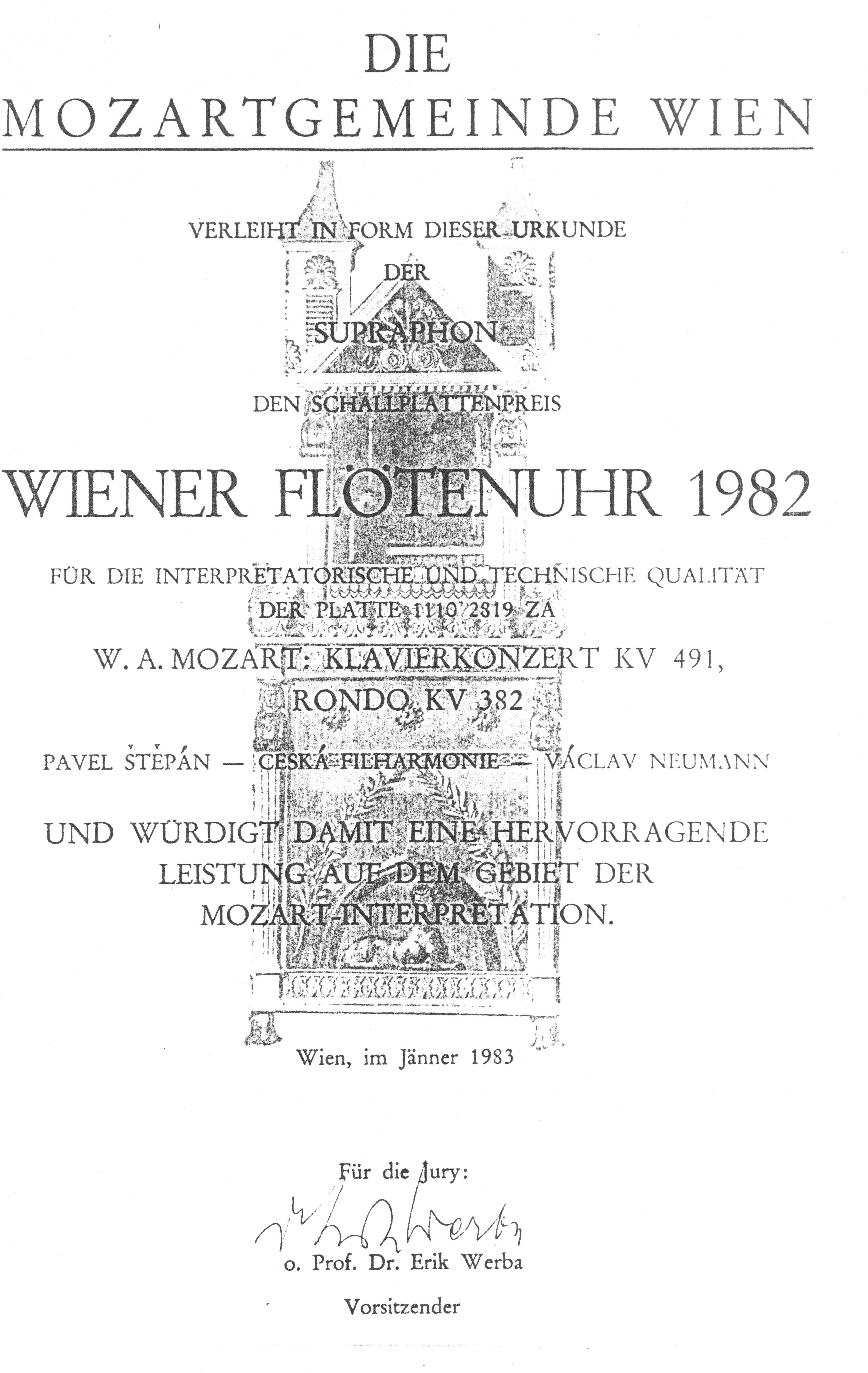 Wiener Flotenuhr1982